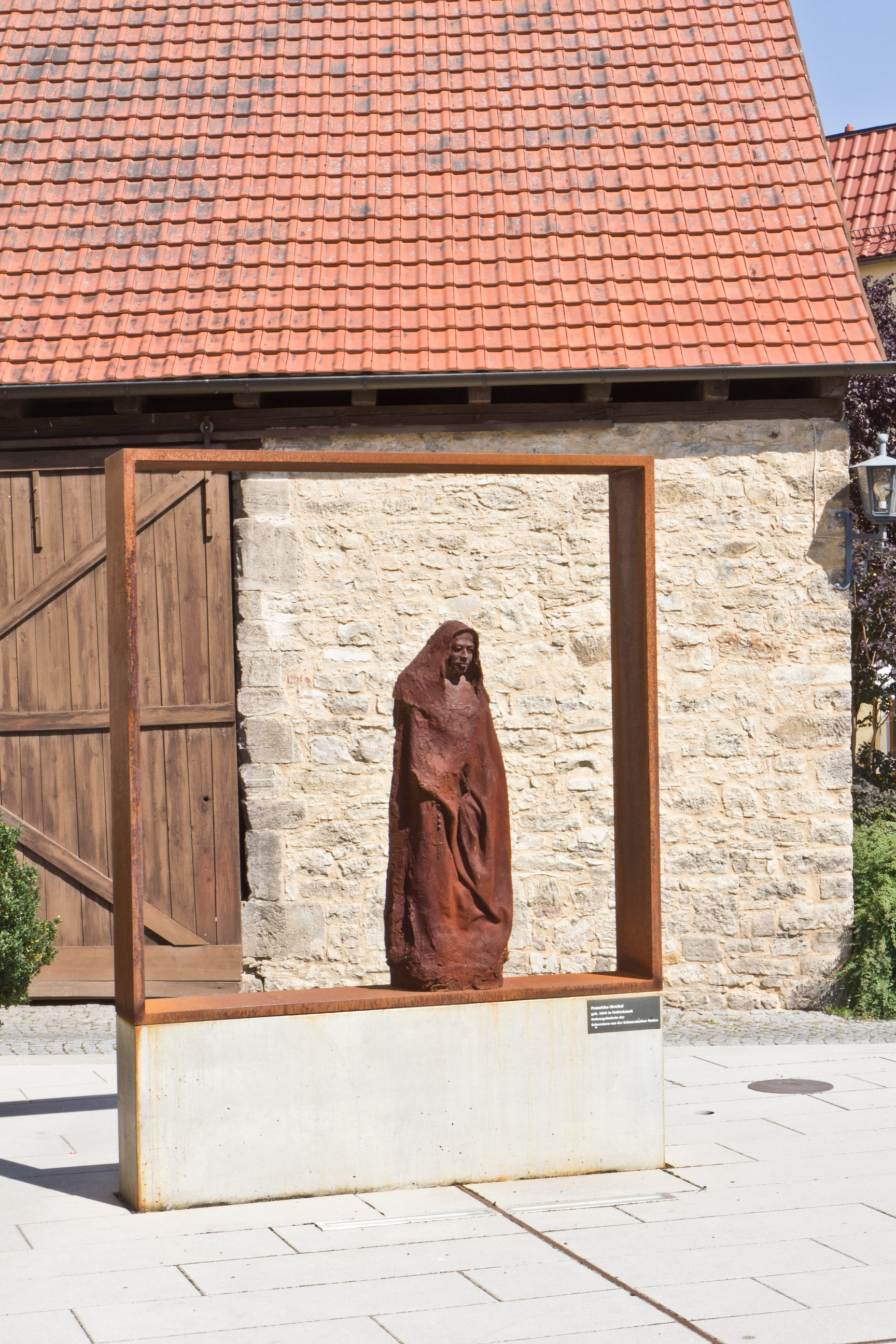 Franziska Streitel (* 24. November 1844 in Mellrichstadt; † 6. März 1911 in Castel S. Elia bei Rom) war die Gründerin der Kongregation der Schwestern von der Schmerzhaften Mutter (SSM)